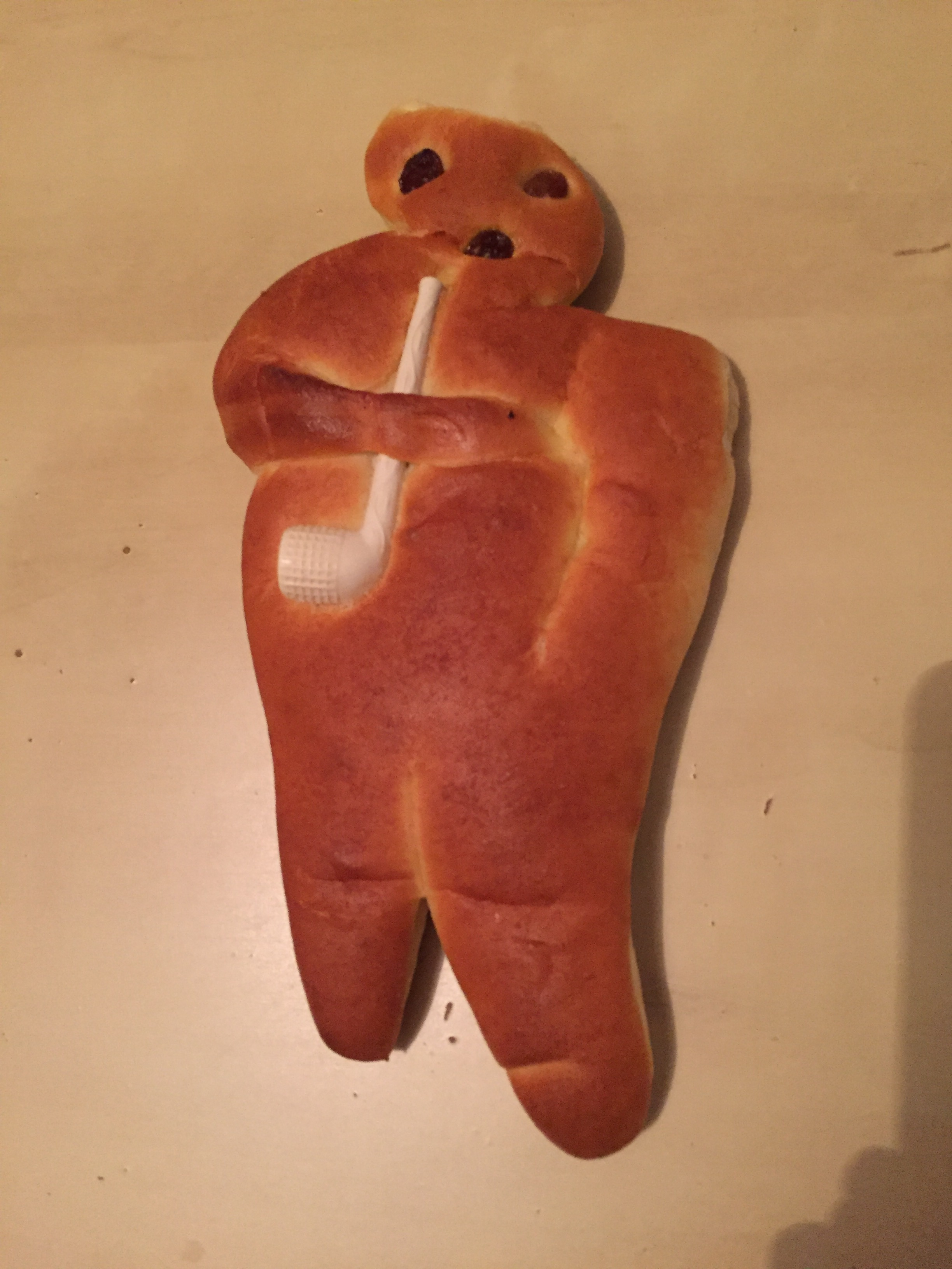 Stutenkerl